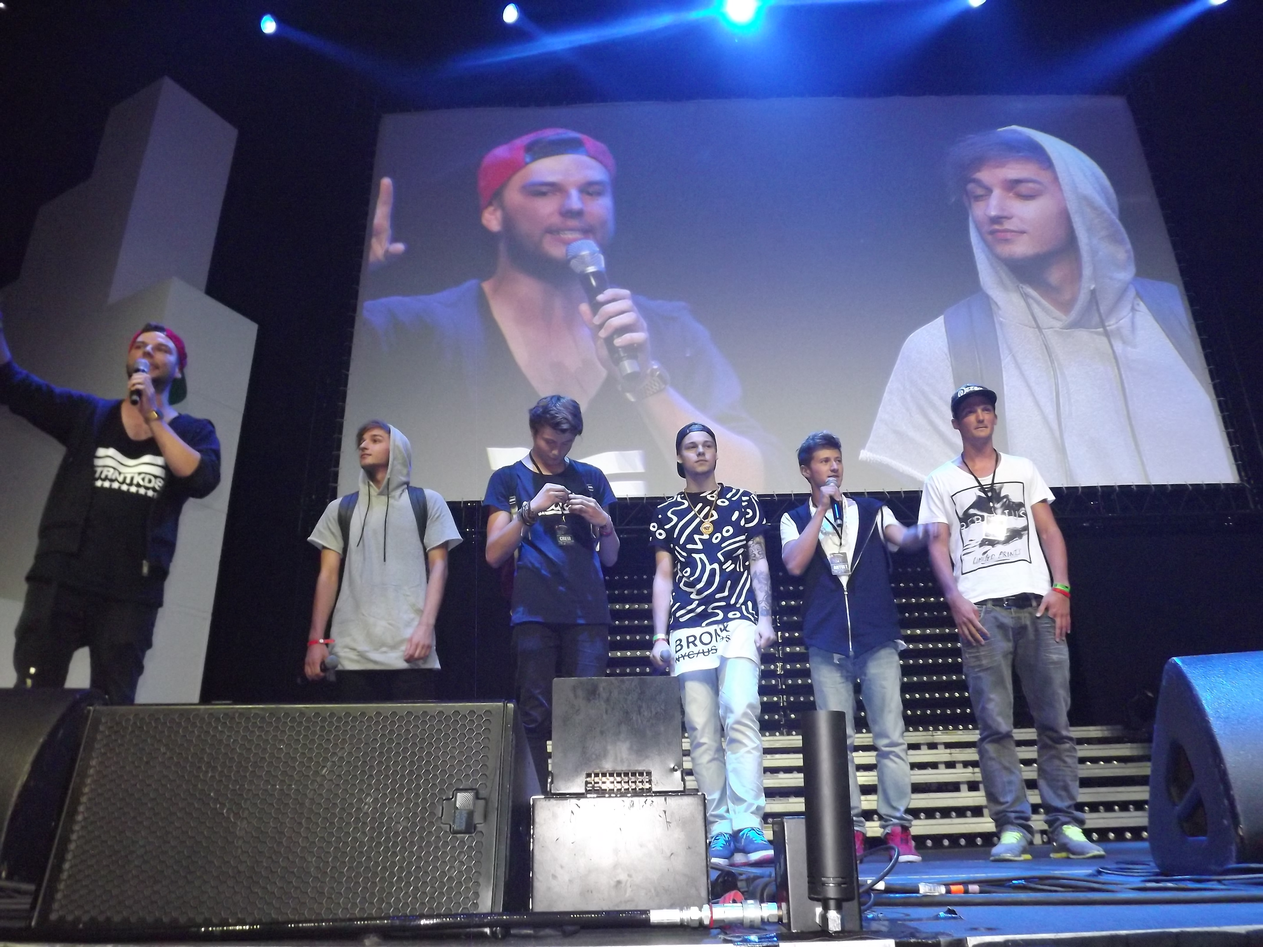 Eine Auswahl deutscher YouTuber während der Center Show des Videodays 2014, v. Li: Flovloggt, Ardy, Dner, Taddl, izzi, hallodri